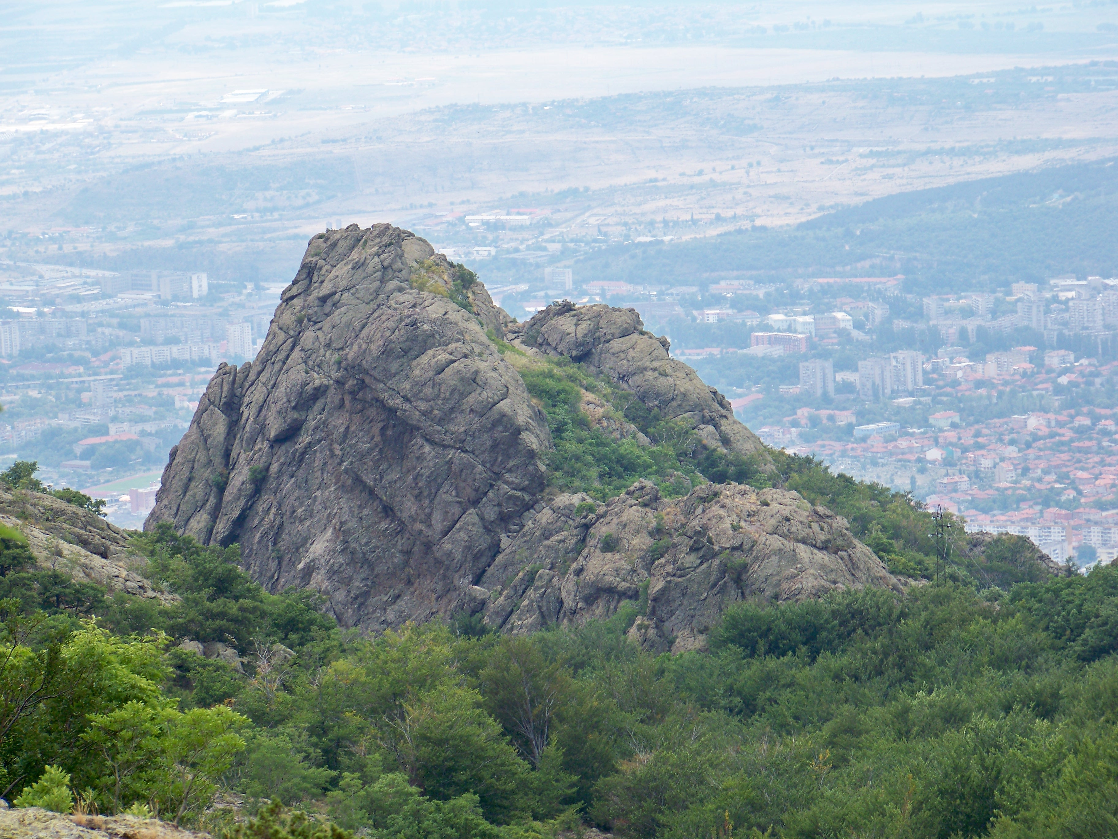 Карандила е български курорт, разположен на 10 км от Сливен.